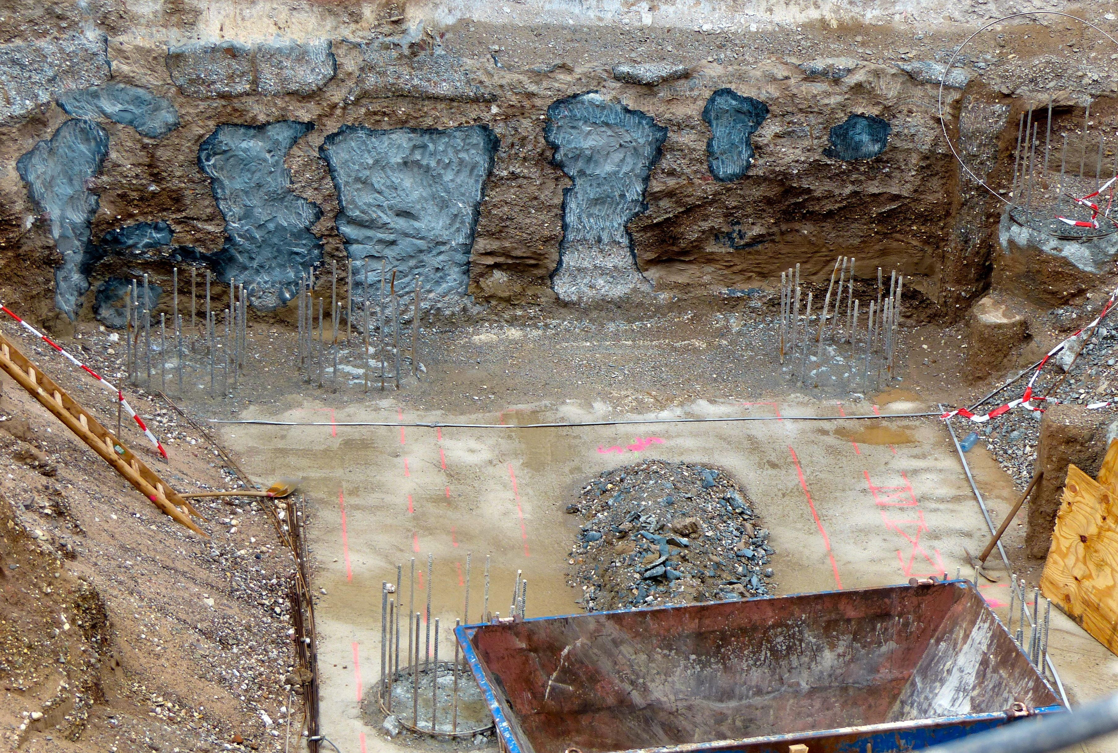 Opernhaus, Offenbachplatz 2; Gründungssohle des Opernhauses Köln mit angeschnittenen BohrpfählenThis is a photograph of an architectural monument.